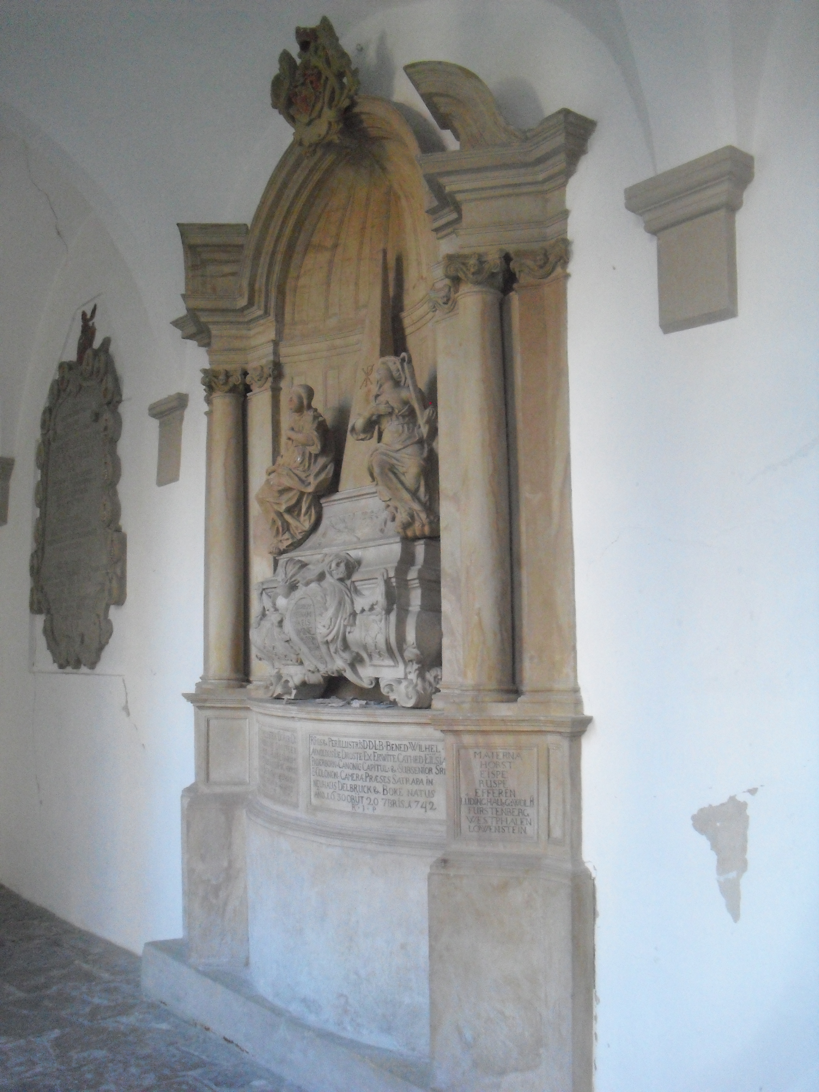 Epitaph der Domherren Ferdinand Friedrich von Droste zu Erwitte und Benedict Wilhelm Arnold Droste zu Erwitte im Paderborner Dom